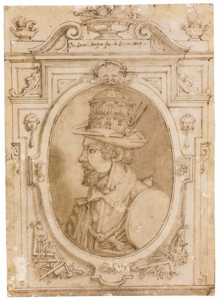 Вигаданий портрет Мікеланджело Буонарроті, котрий створив невідомий послідовник Джузепе Арчімбольдо